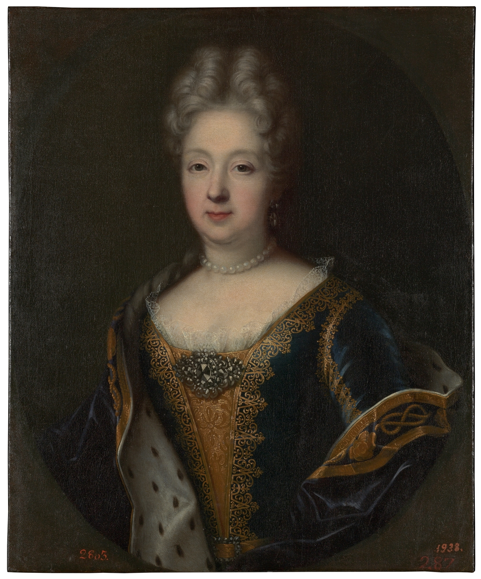 Retrato de María Juana Bautista de Saboya-Nemours (1644-1724), que fue hija de Carlos Amadeo de Saboya-Nemours, duque de Nemours, y duquesa consorte de Saboya por su matrimonio con el duque Carlos Manuel II de Saboya. En este retrato la modelo luce un rico vestido y manto de armiño de terciopelo azul bordado en oro. En la orla del manto alternan rosas y el nudo lasca, conocido como nudo del amor y de la amistad, símbolos de la Casa ducal de Saboya.